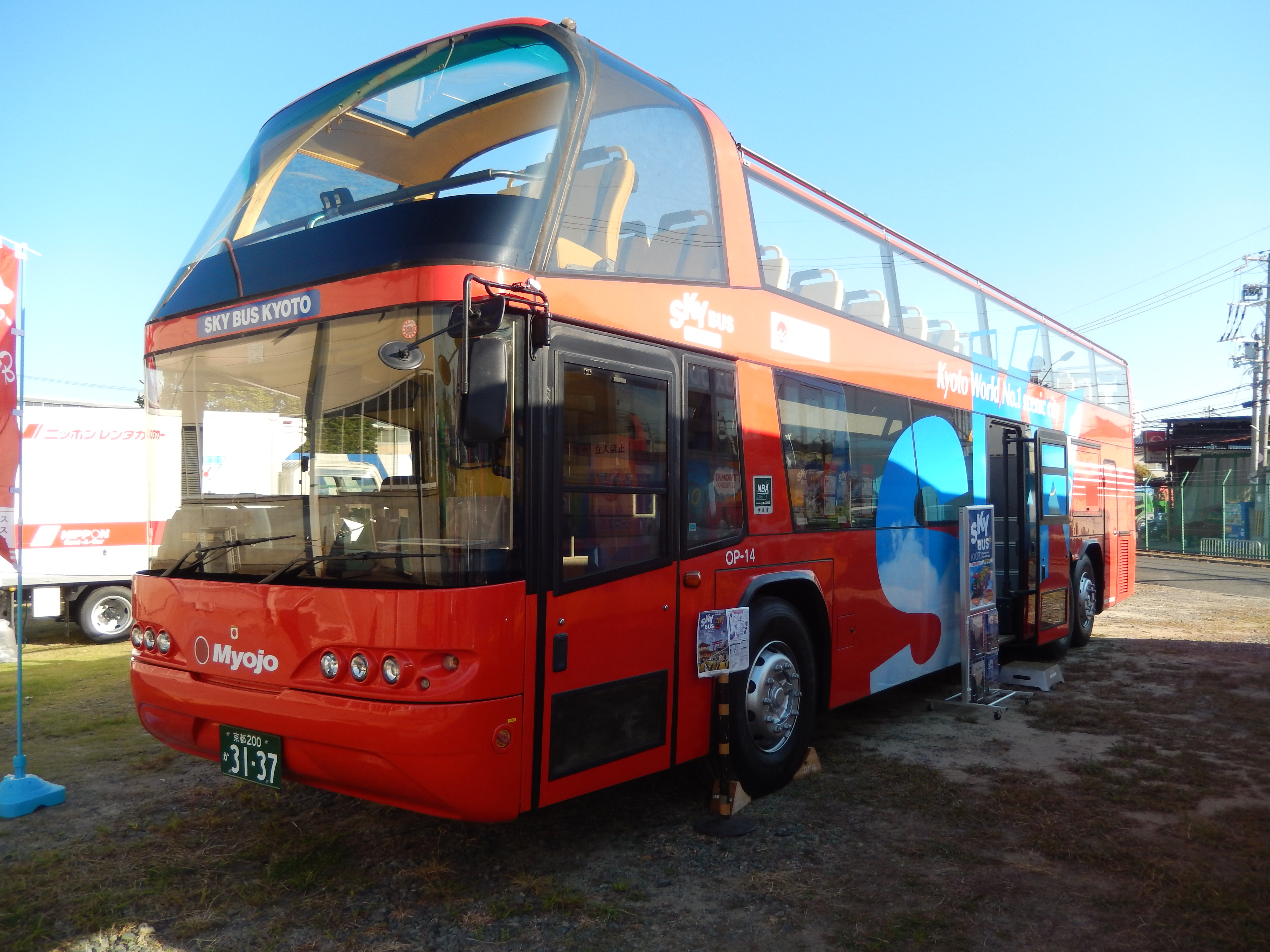 ネオプラン・スカイライナー スカイバス